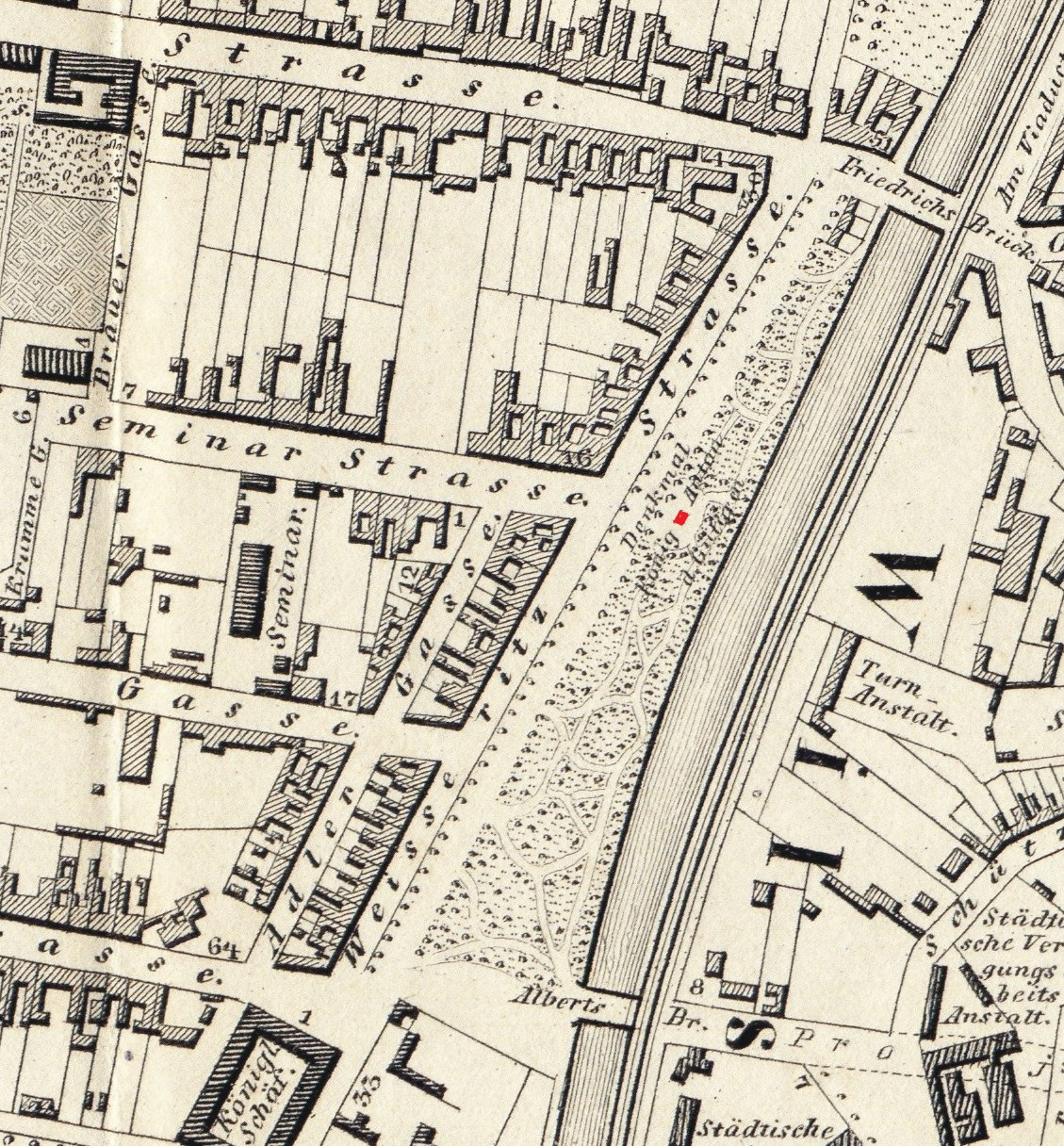 Lage des König-Anton-Denkmals von 1835 auf einem Plan von 1863